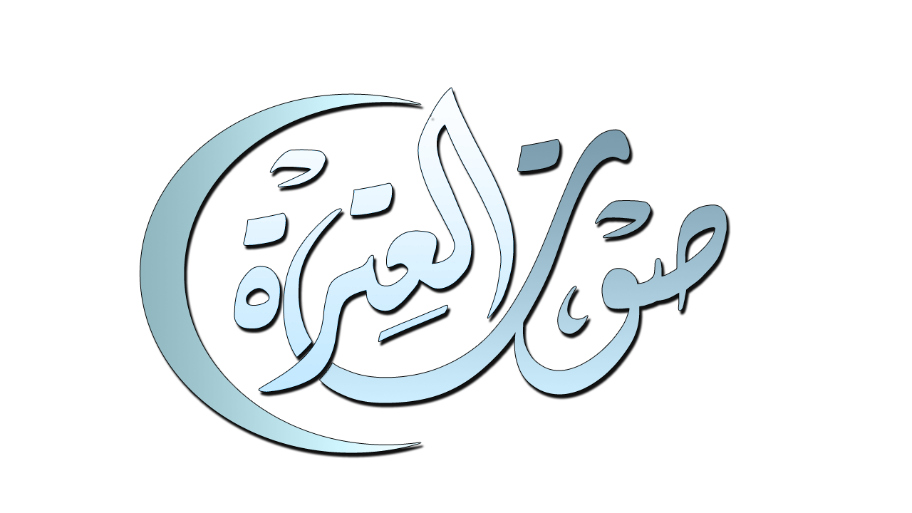 صورة شعار قناة صوت العترة الاسلامية الشيعية